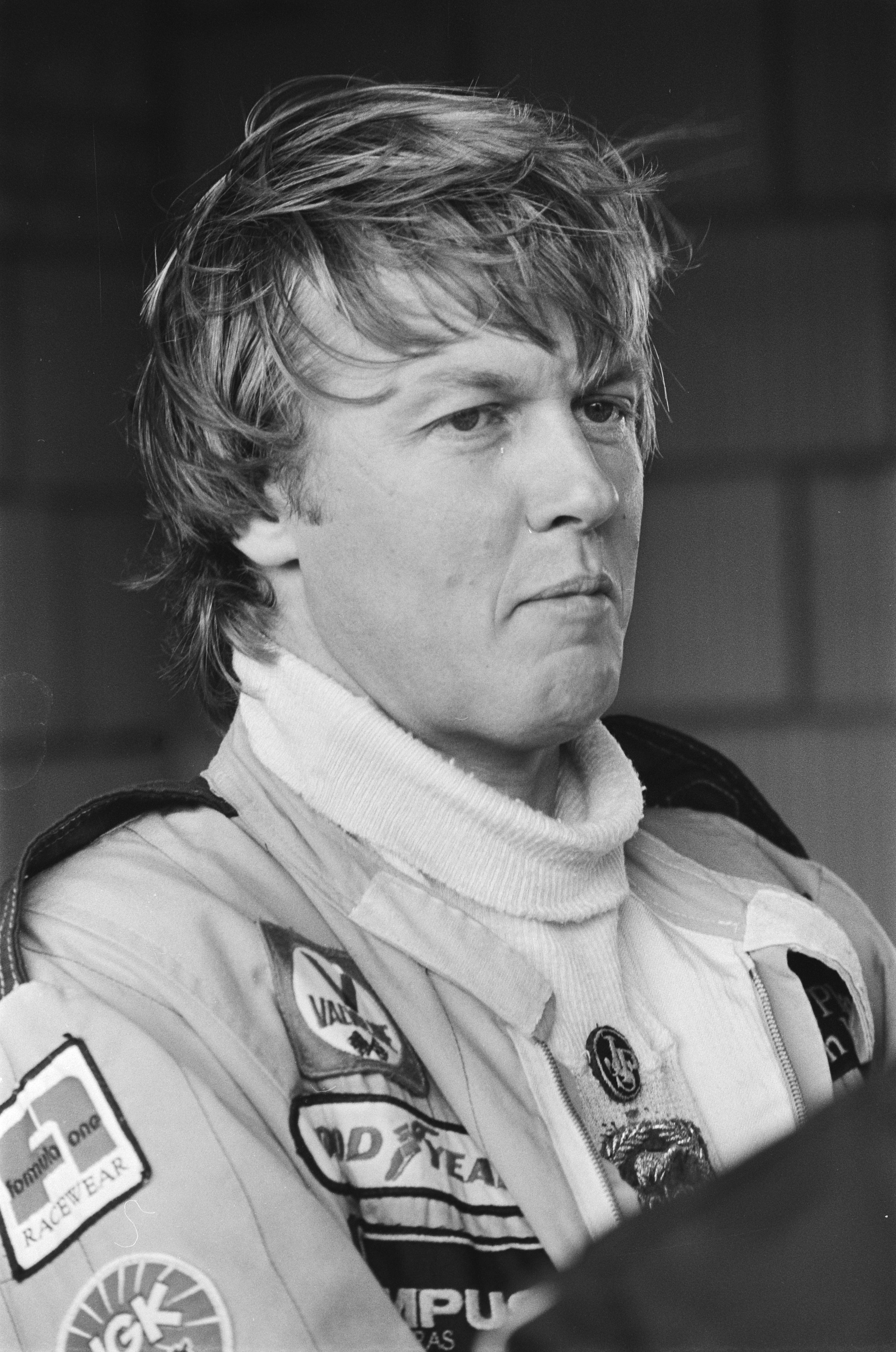 Grand Prix Zandvoort; Ronnie Petterson (kop).